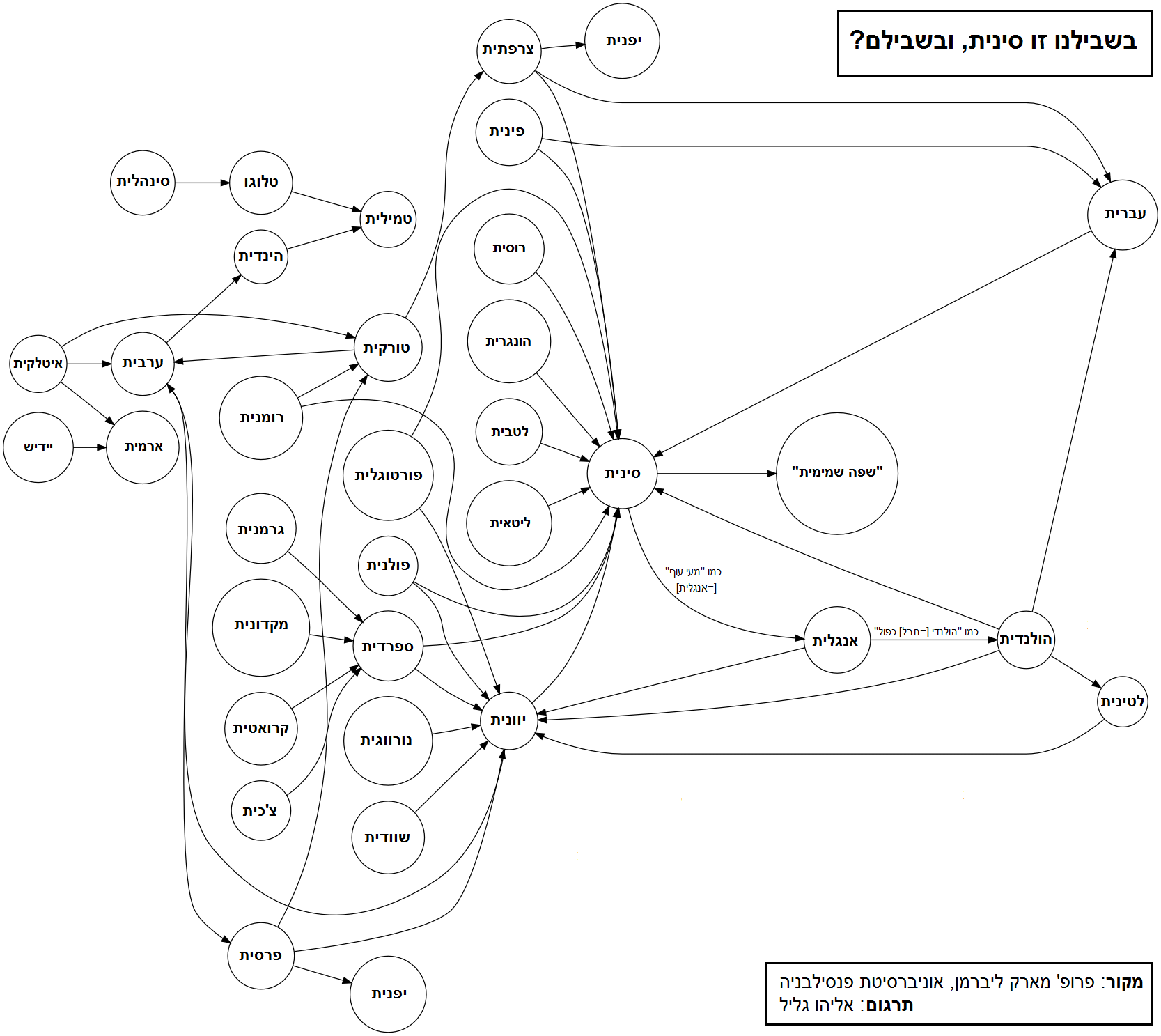 תרשים המציג את הביטוי בשפות שונות ואת הקשר בין השפות.